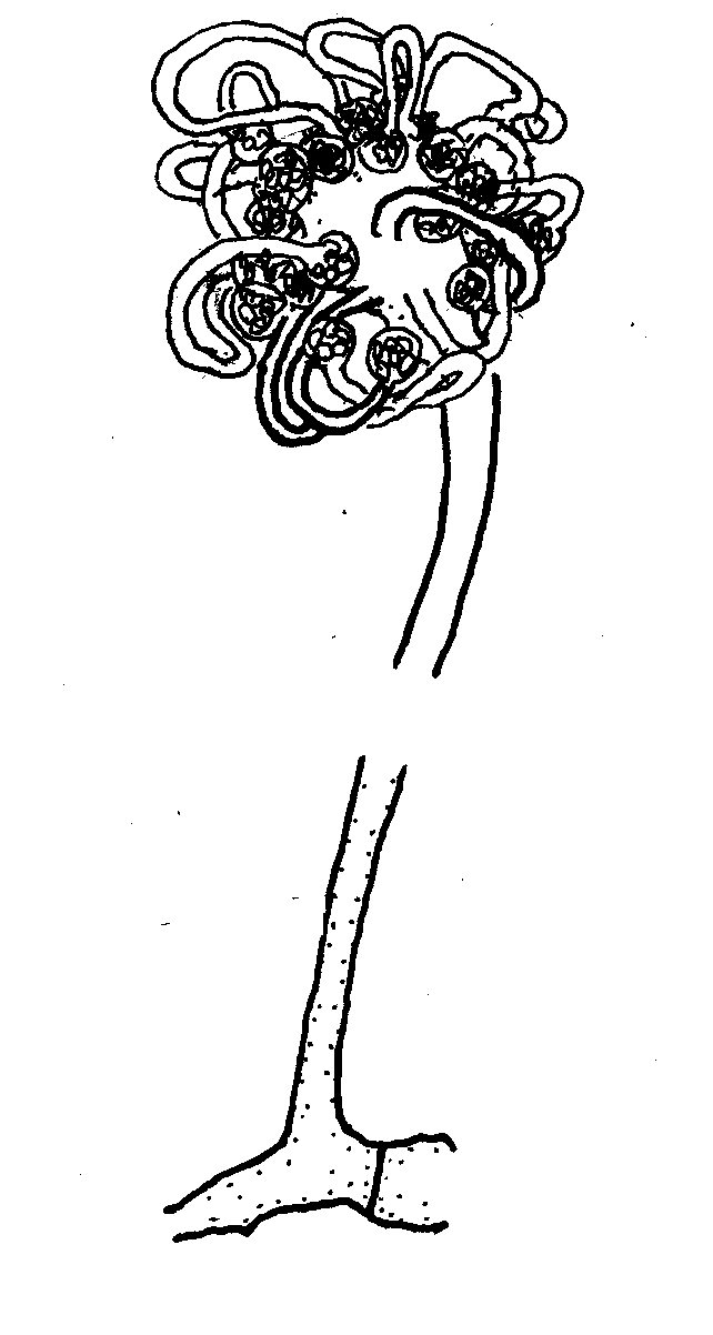 Cokeromyces recurvatus Shanor et al.(1950)より模写